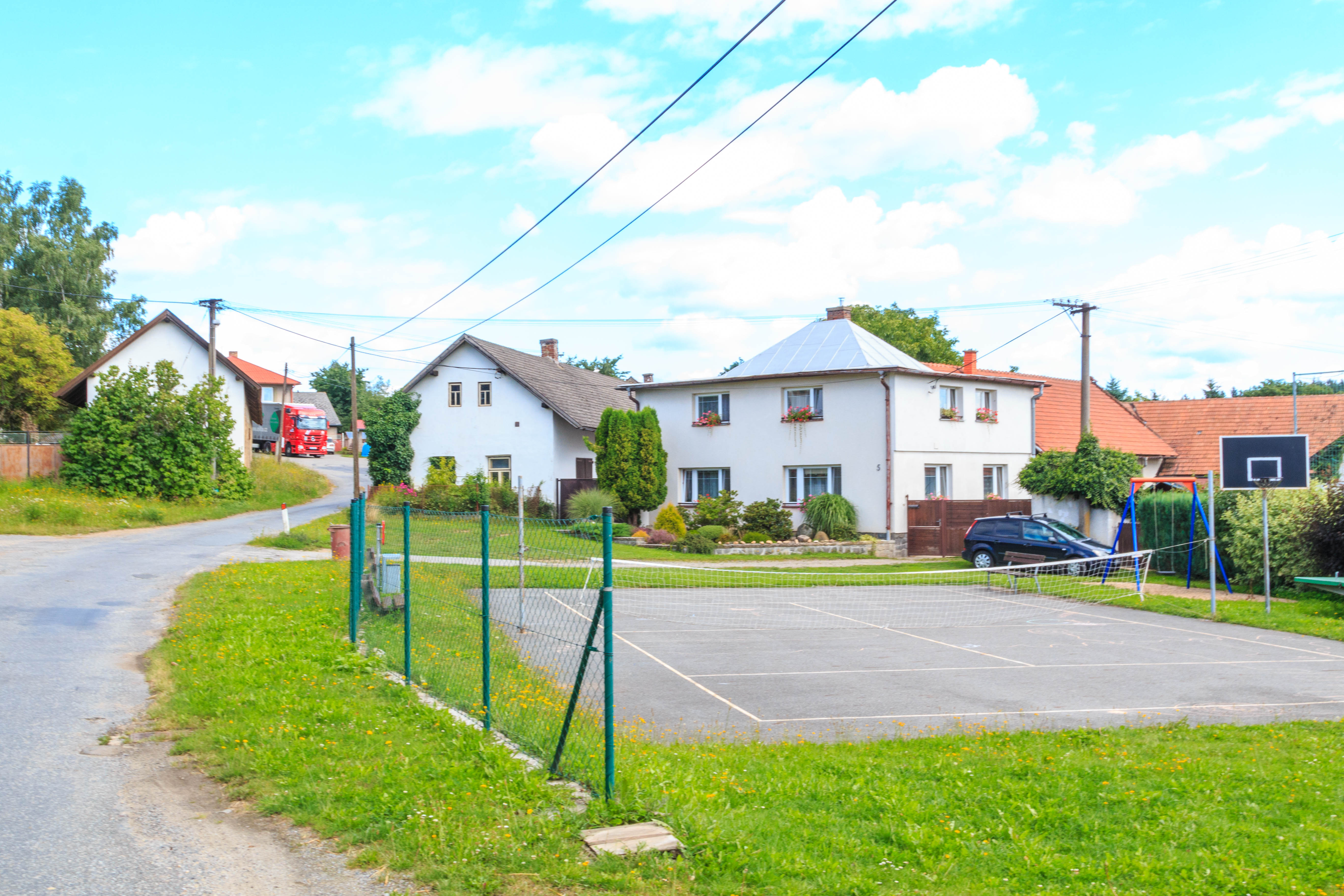 Zbožice - hřiště